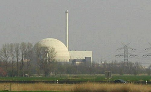 Kernkraftwerk Unterweser (Landkreis Wesermarsch)